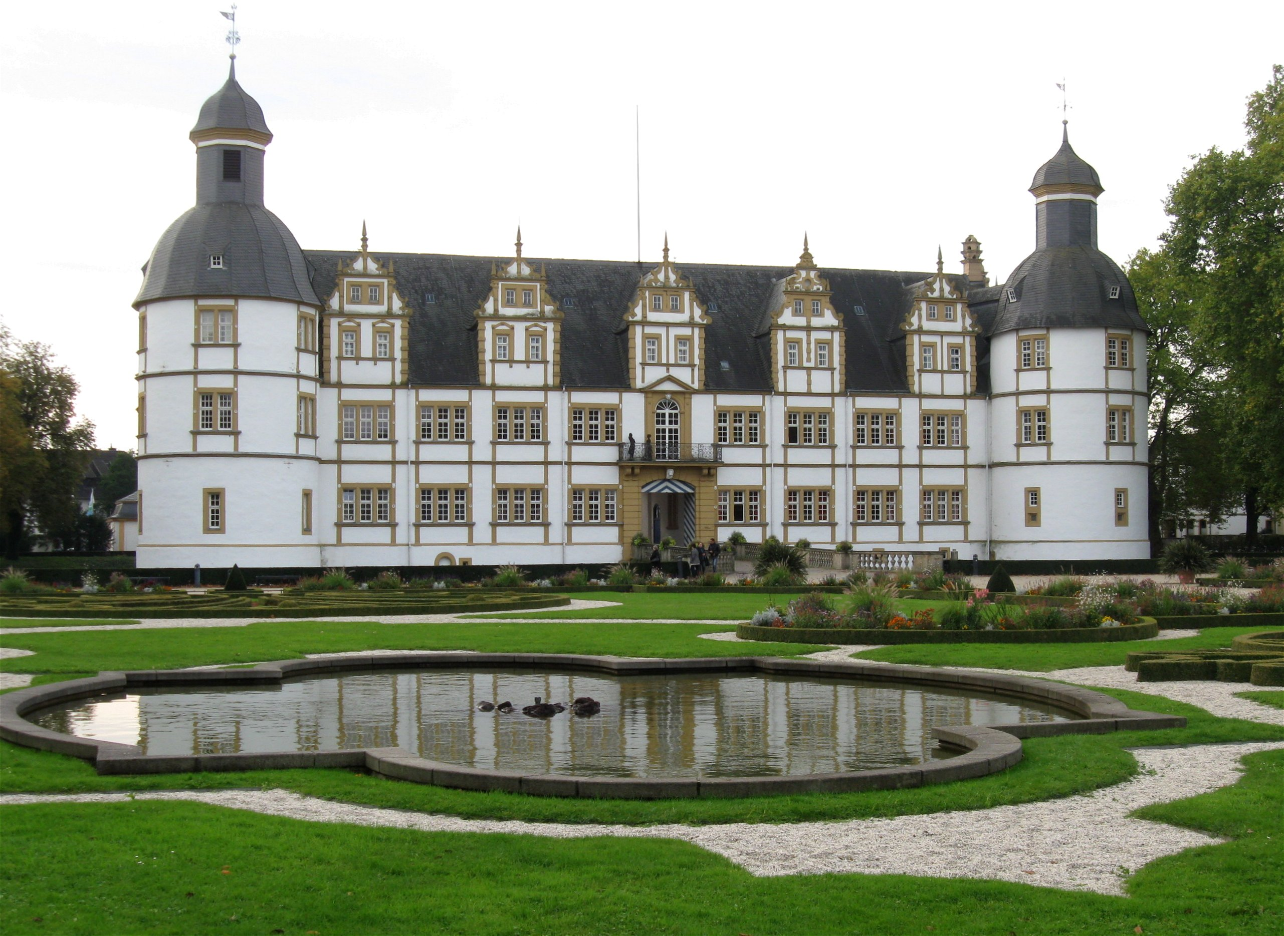 Schloss Neuhaus, Paderborn, Gartenseite